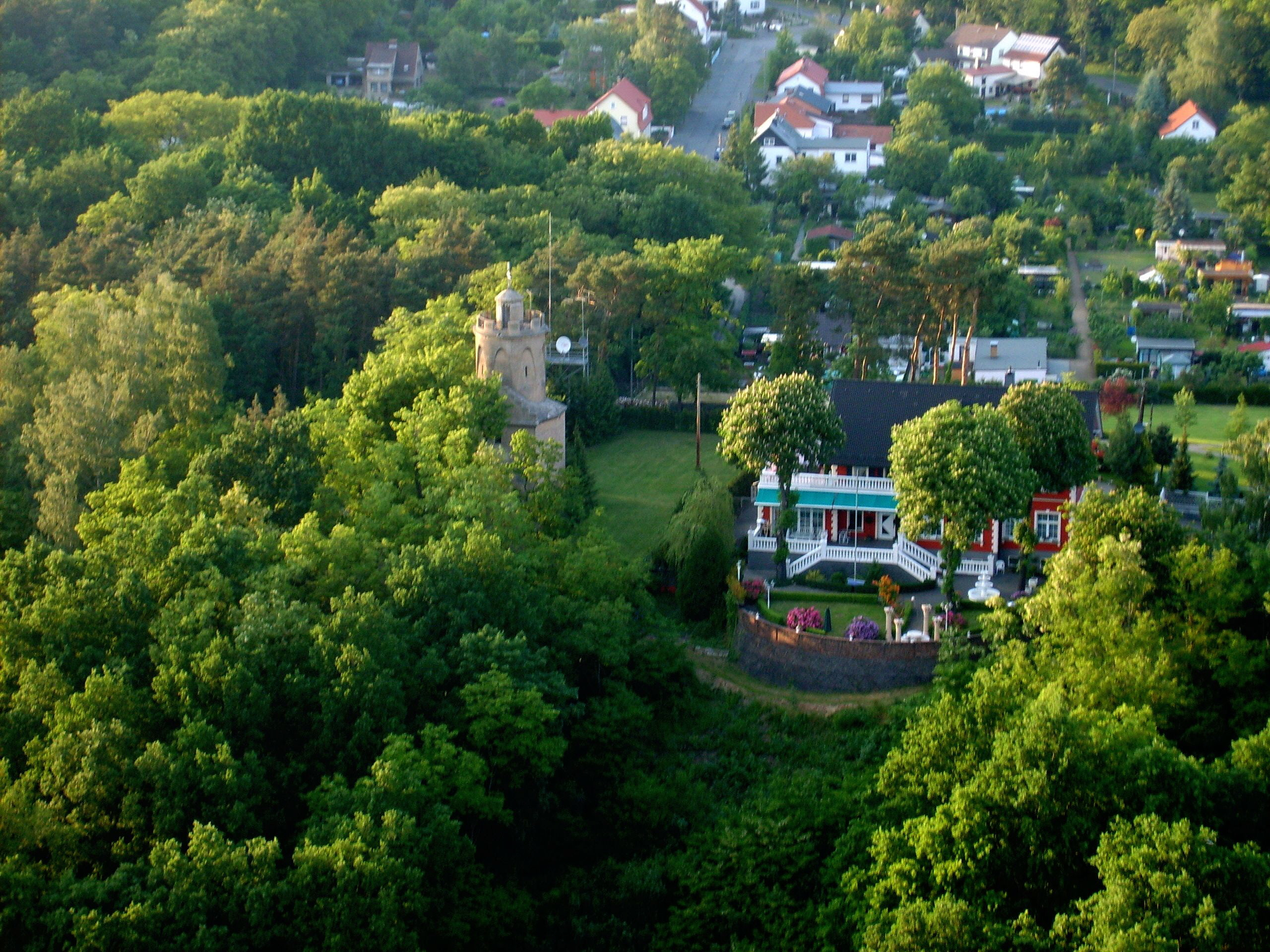 Bilder vom Wasserturm auf dem Winterberg in Biehla. Der Wasserturm und die ehemalige Gaststätte Winterberg in Biehla aus der Luft betrachtet.